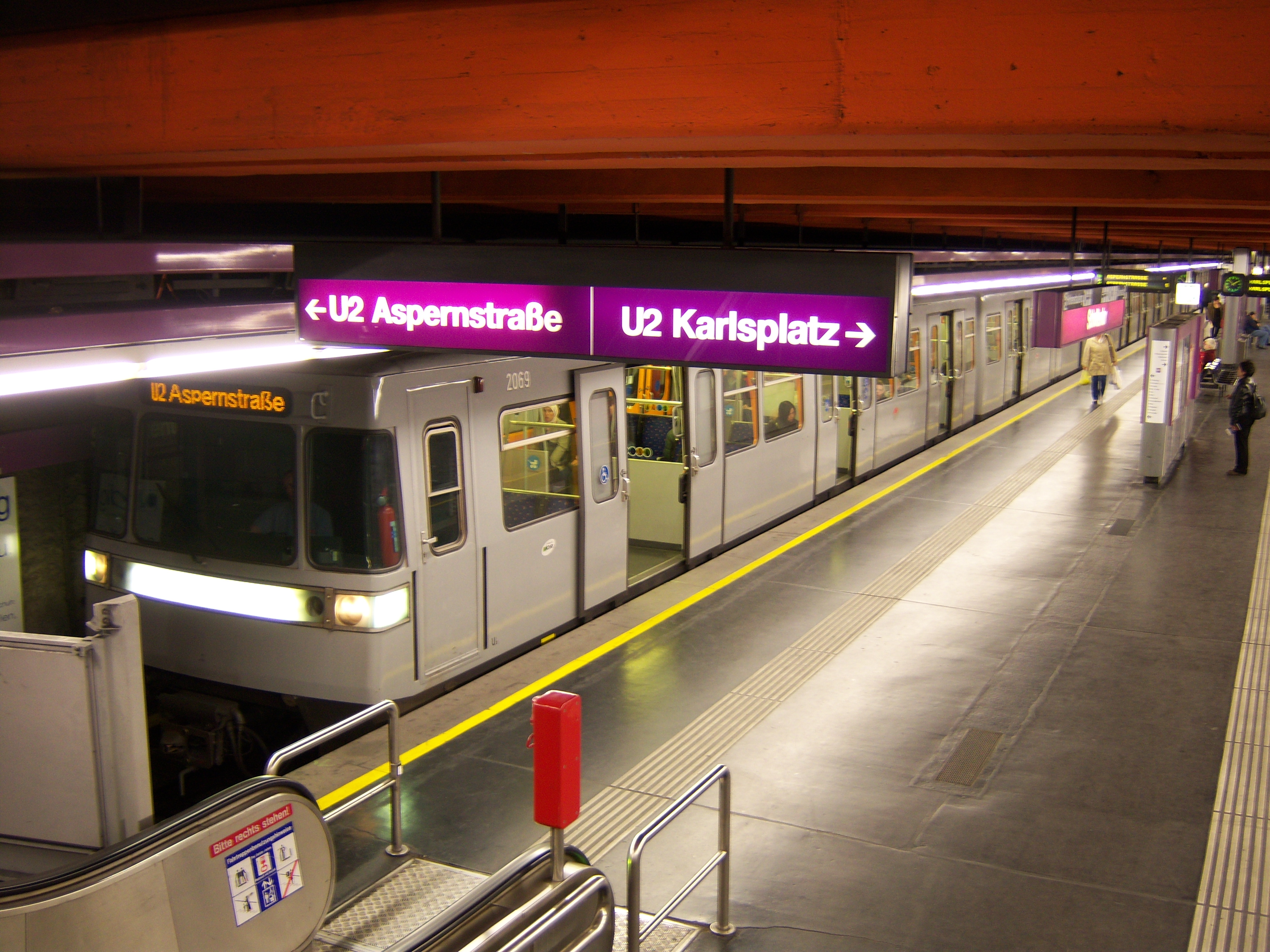 U-Bahn-Station Schottentor